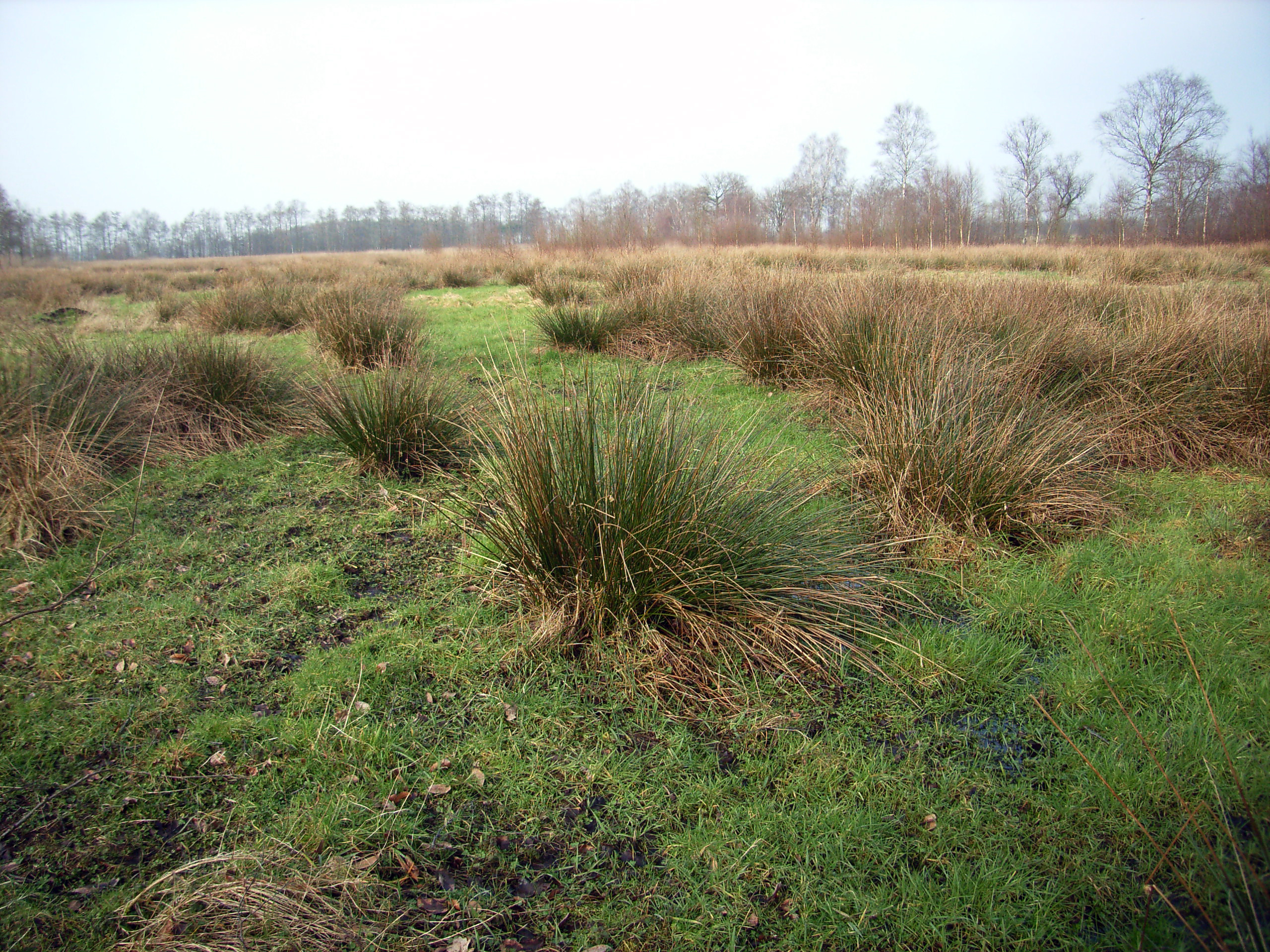 Feuchtes Grünland (ehemaliges Hochmoor) mit Flatterbinsen-Horsten (Juncus effusus), Nordwestdeutschland